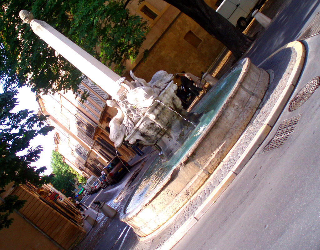 Fontaine des Quatre-Dauphins, Aix-en-Provence (France).